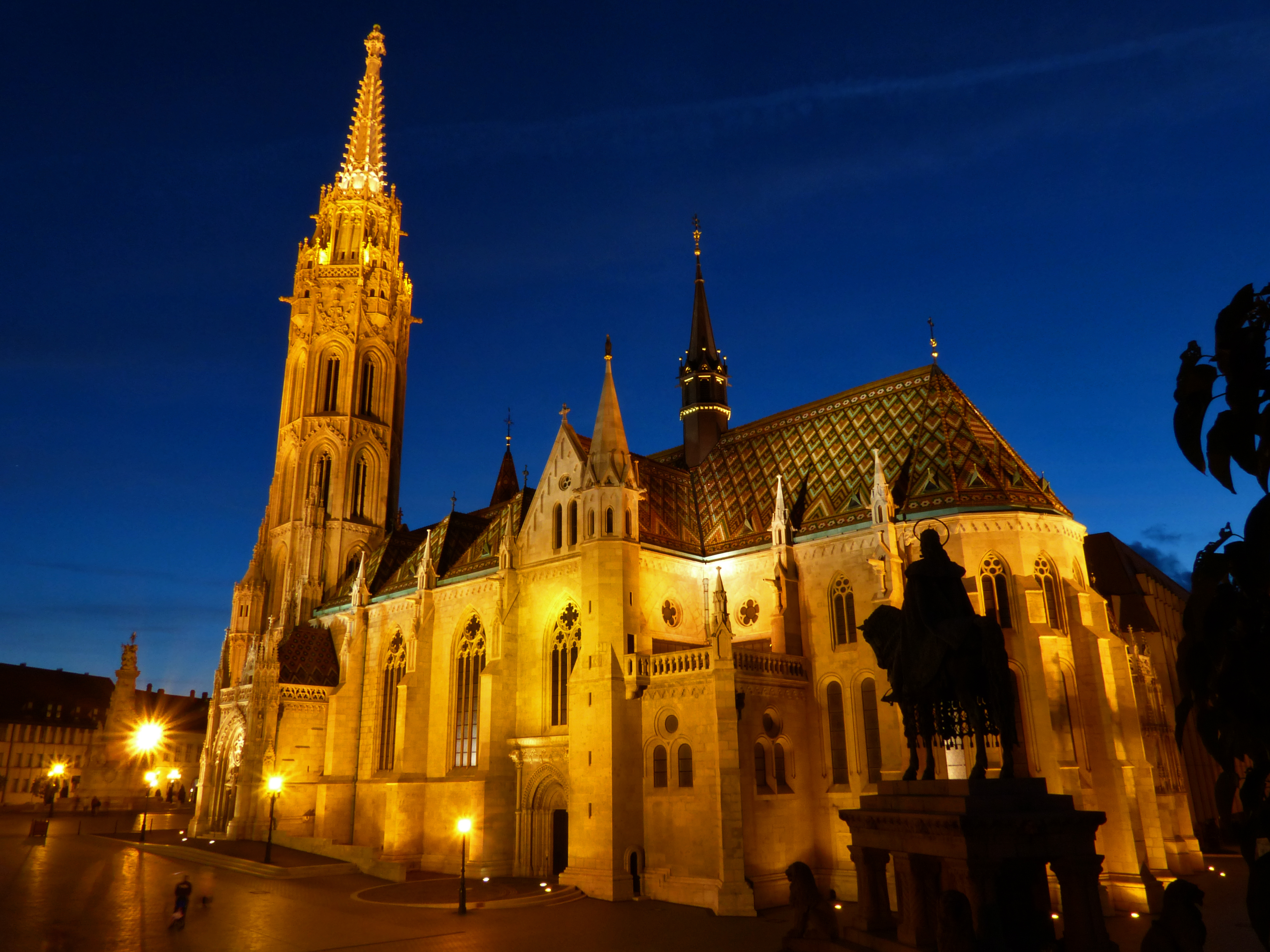 Matthiaskirche in Budapest, Abendstimmung